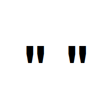 Des guillemets anglais (police Arial).